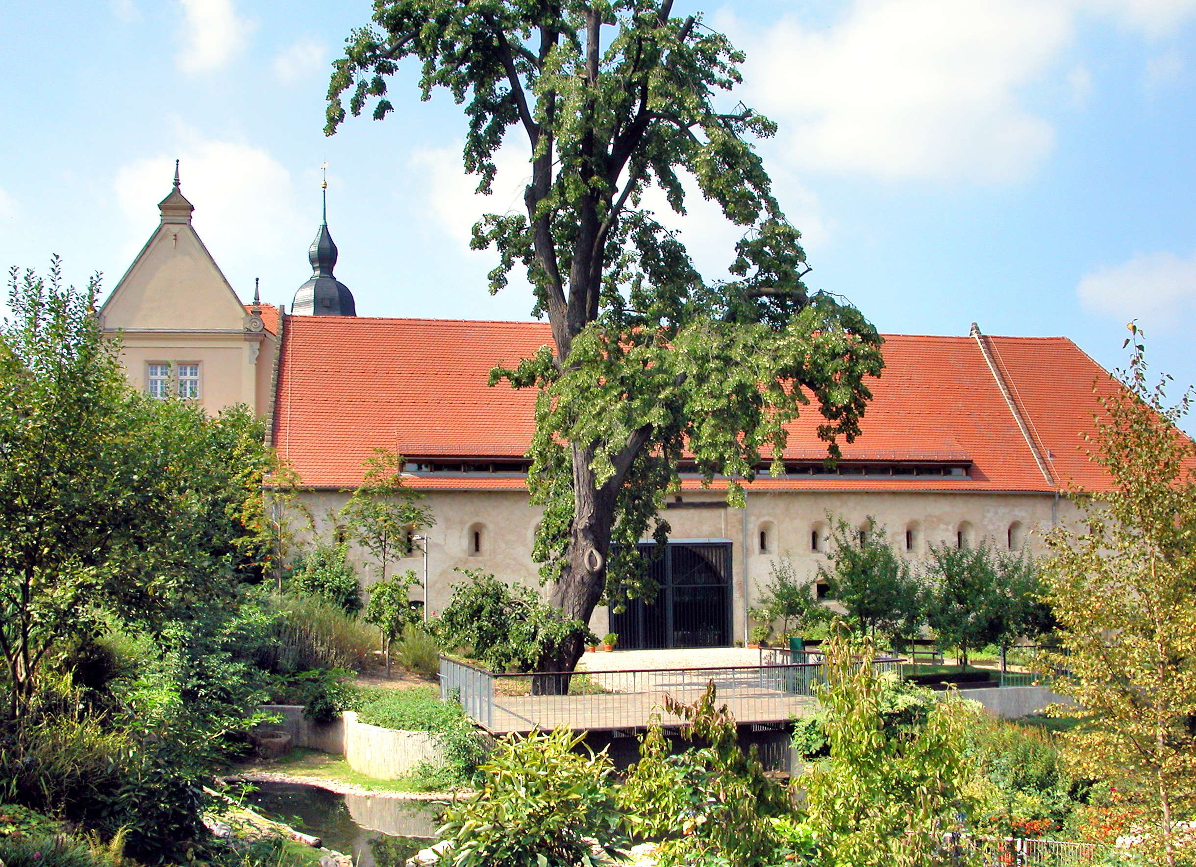 26.08.2007 01587 Riesa: Nach Auflösung des Klosters 1554 erfolgte der Umbau zum Schloß und seit 1874 ist es Rathaus. Östlicher Klosterflügel von Osten gesehen. [DSCN29133.TIF]20070826650DR.JPG(c)Blobelt